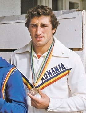 Vasile Andrei, 1980 Olympics